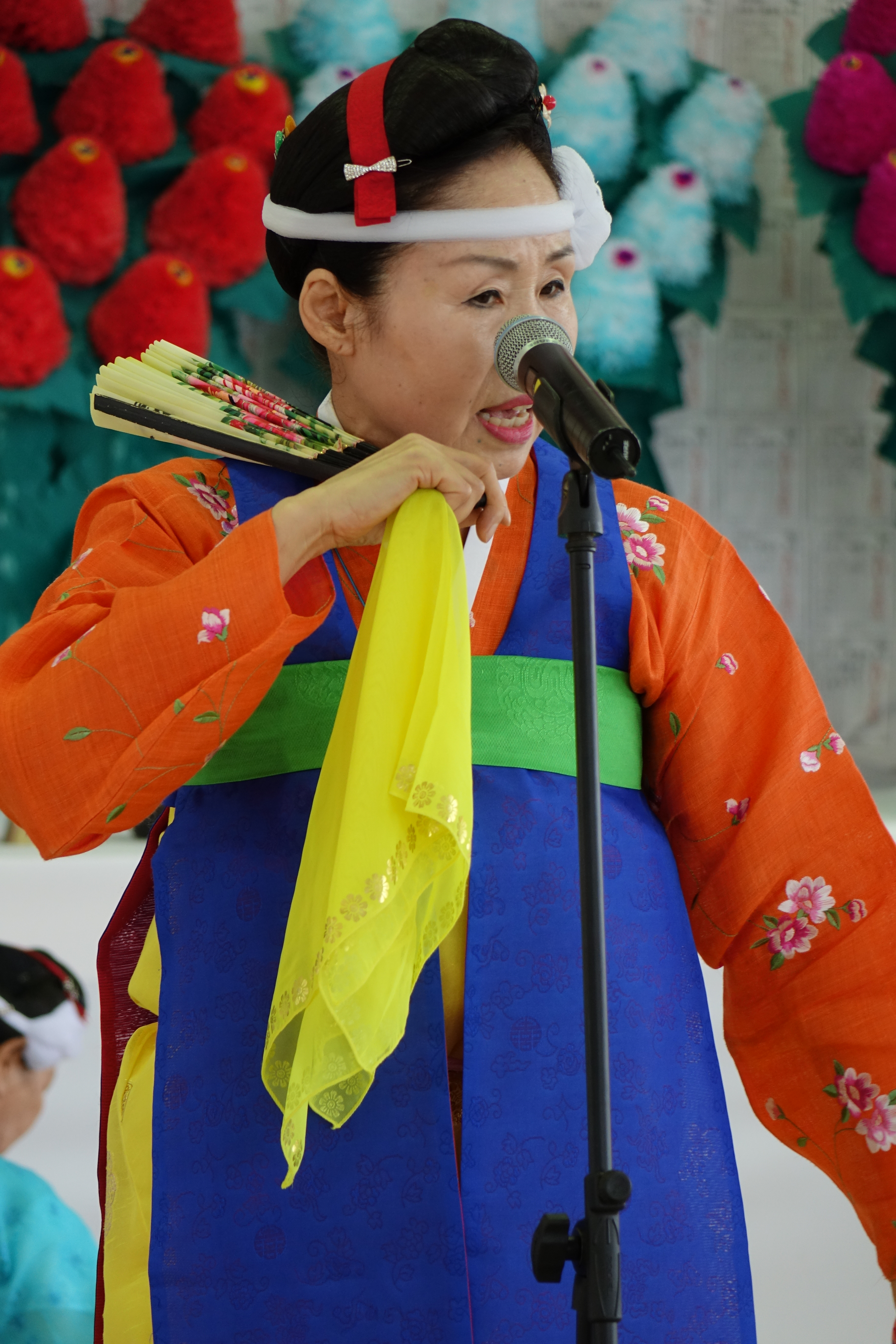 최광모 촬영 사진 (Photos taken by Choe Kwangmo)